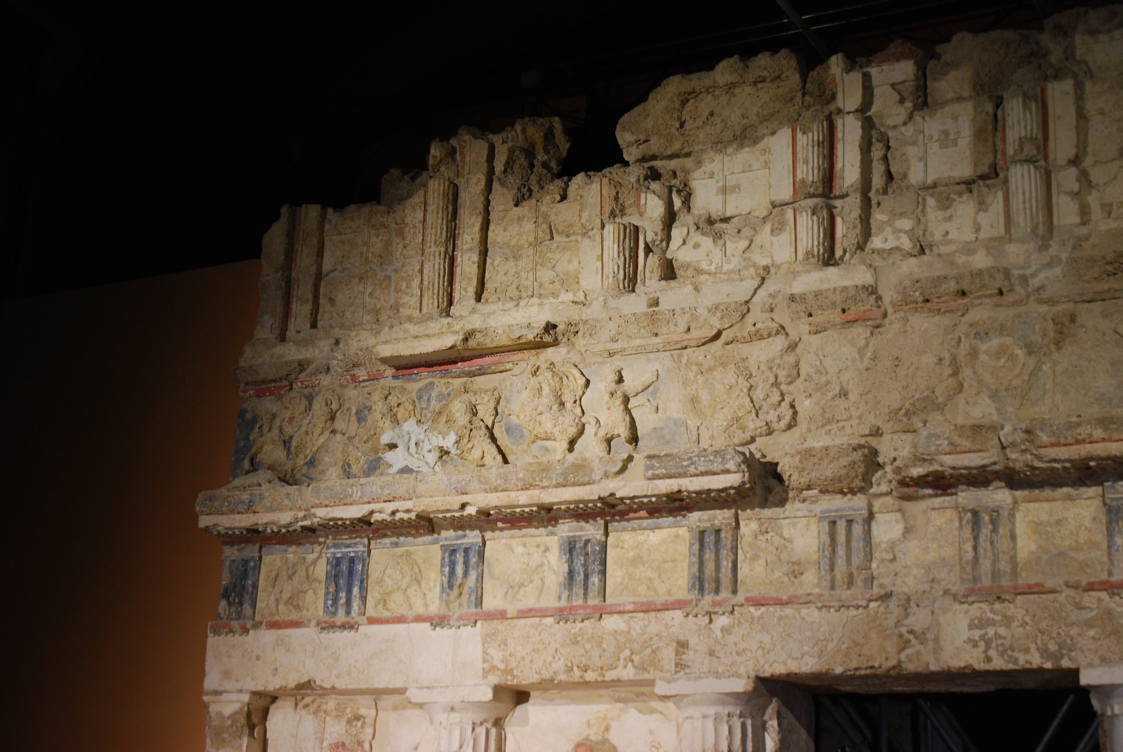 Vue des tombes macédoniennes de Mieza (Naousa).